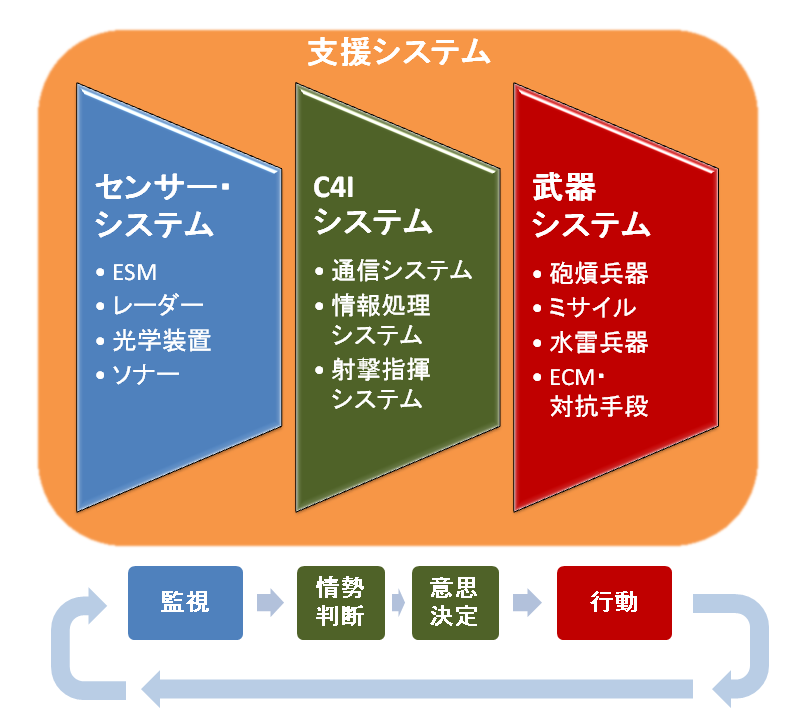 システム艦の装備する戦闘システムの概要図。